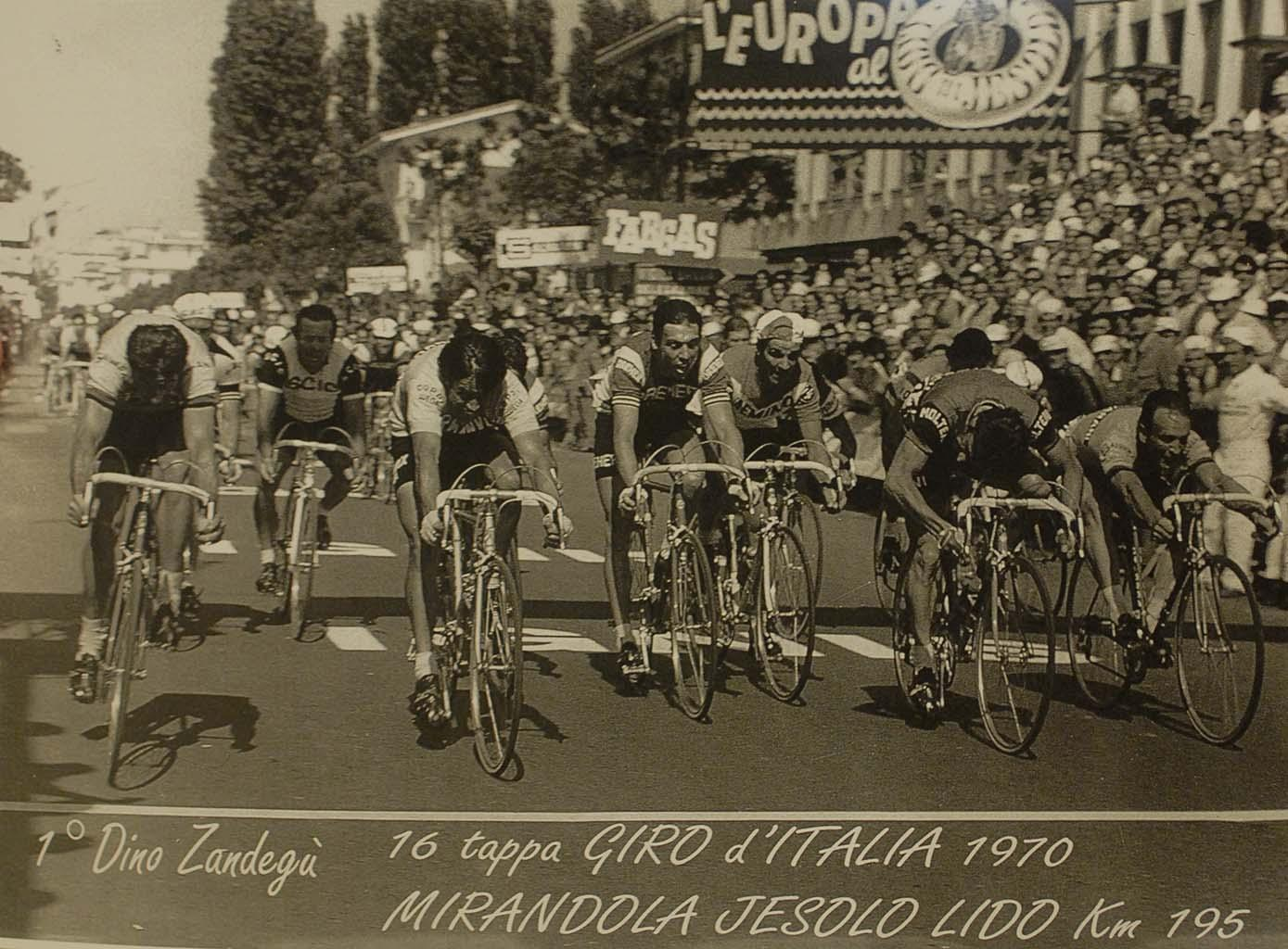 Dino Zandegù (il primo a sinistra) vince la volata della 16ª tappa del Giro d'Italia 1970 da Mirandola al Lido di Jesolo